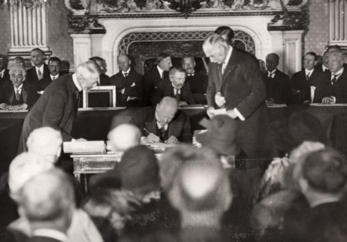 Pacten. De ondertekening van het Kellogg-pact door de Duitser Gustav Stresemann. 1928. Plaats: Parijs. Serie van 3 foto's